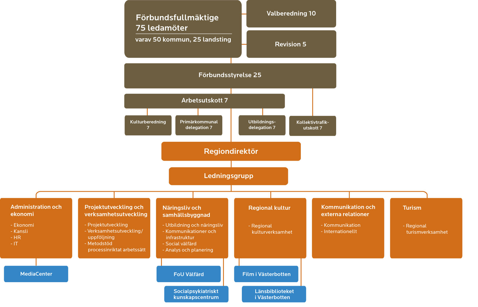 Organisationsskiss med politik, uppdaterad 2016